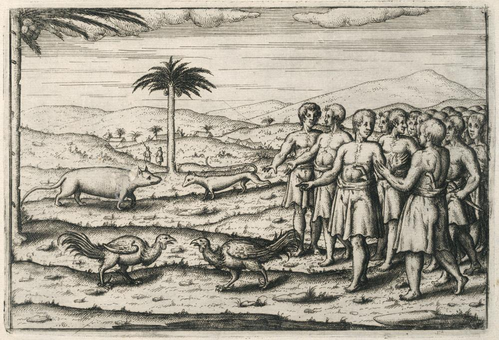 Sabung ayam di Jawa, sekitar 1596